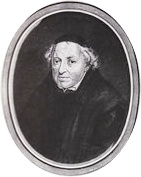 Daniel Papebroch, Jesuit, Bollandist